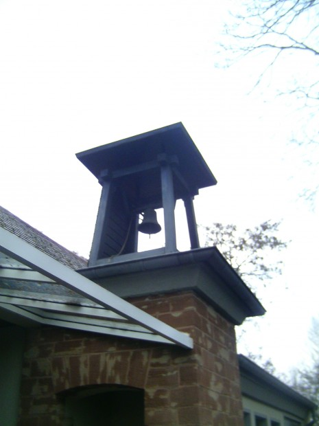 Friedhofshalle auf dem Alten Friedhof von Fraulautern